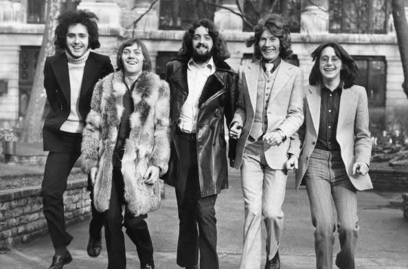 Marmalade - original band - London 1970